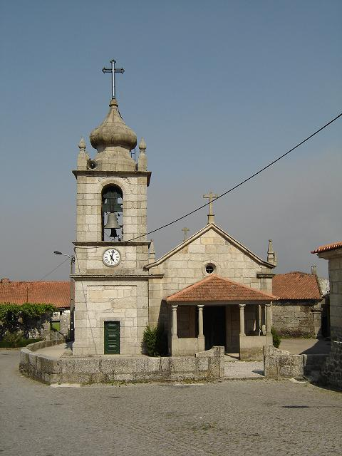 Igreja de Espinho, Braga, Portugal.